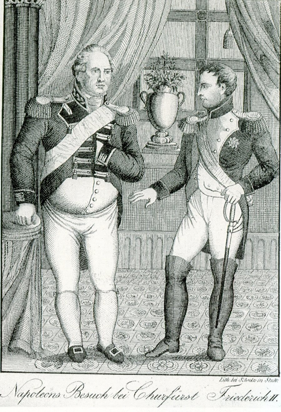 Napoleons Besuch bei Kurfürst Friedrich Auch ohne realistische Größendarstellung der beiden Akteure ist dieses Bild württembergische Propaganda: Friedrich in typischer Napoleonpose, mit nachdrücklicher Faust seinen Standpunkt vertretend. Napoleon mit beschwichtigender Geste. Lithographie Stuttgart, Staatsarchiv, Inv.-Nr. B 641/5